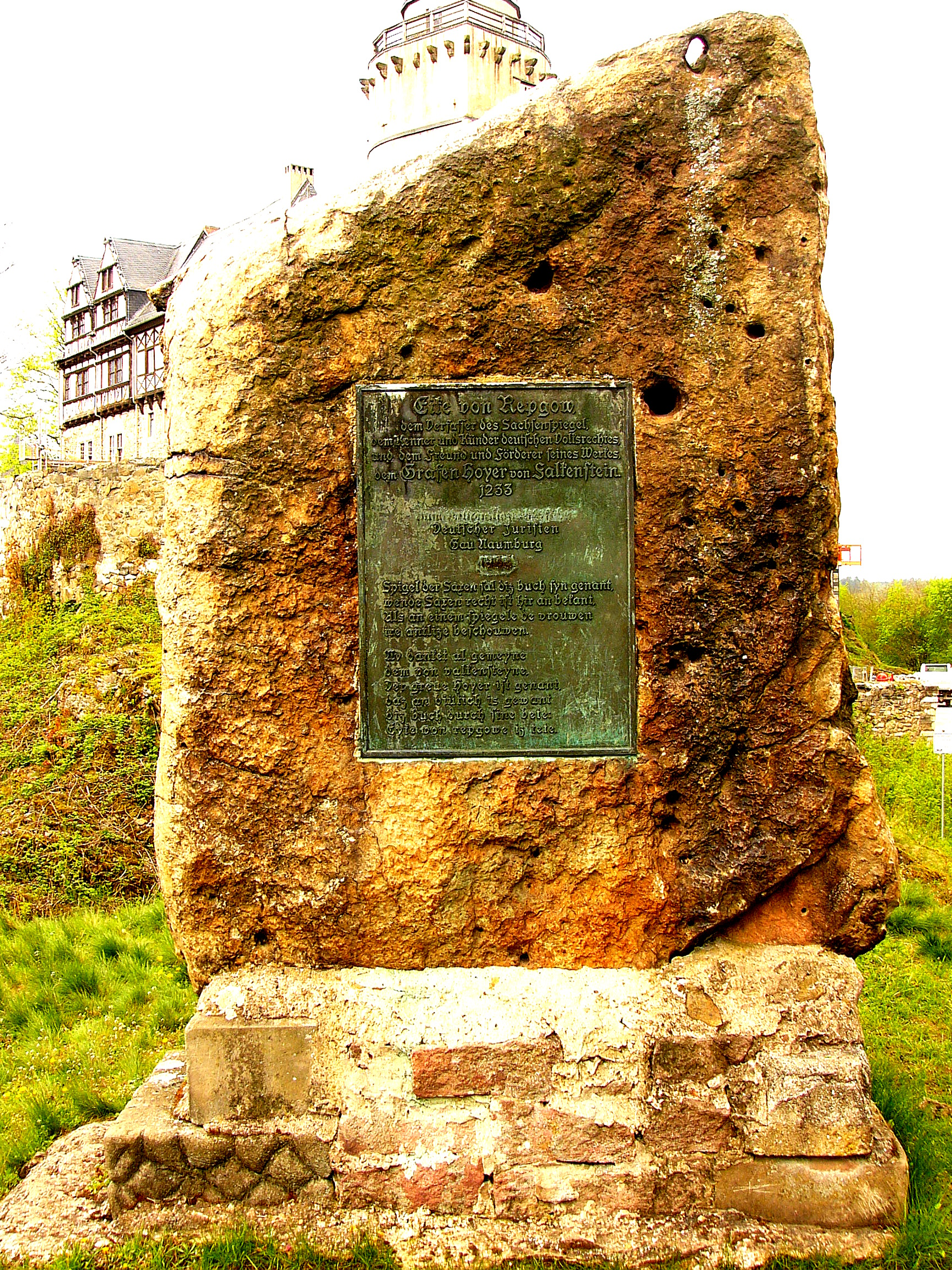 Gedenktafel zu Ehren von Eike von Repgow an der Burg Falkenstein.